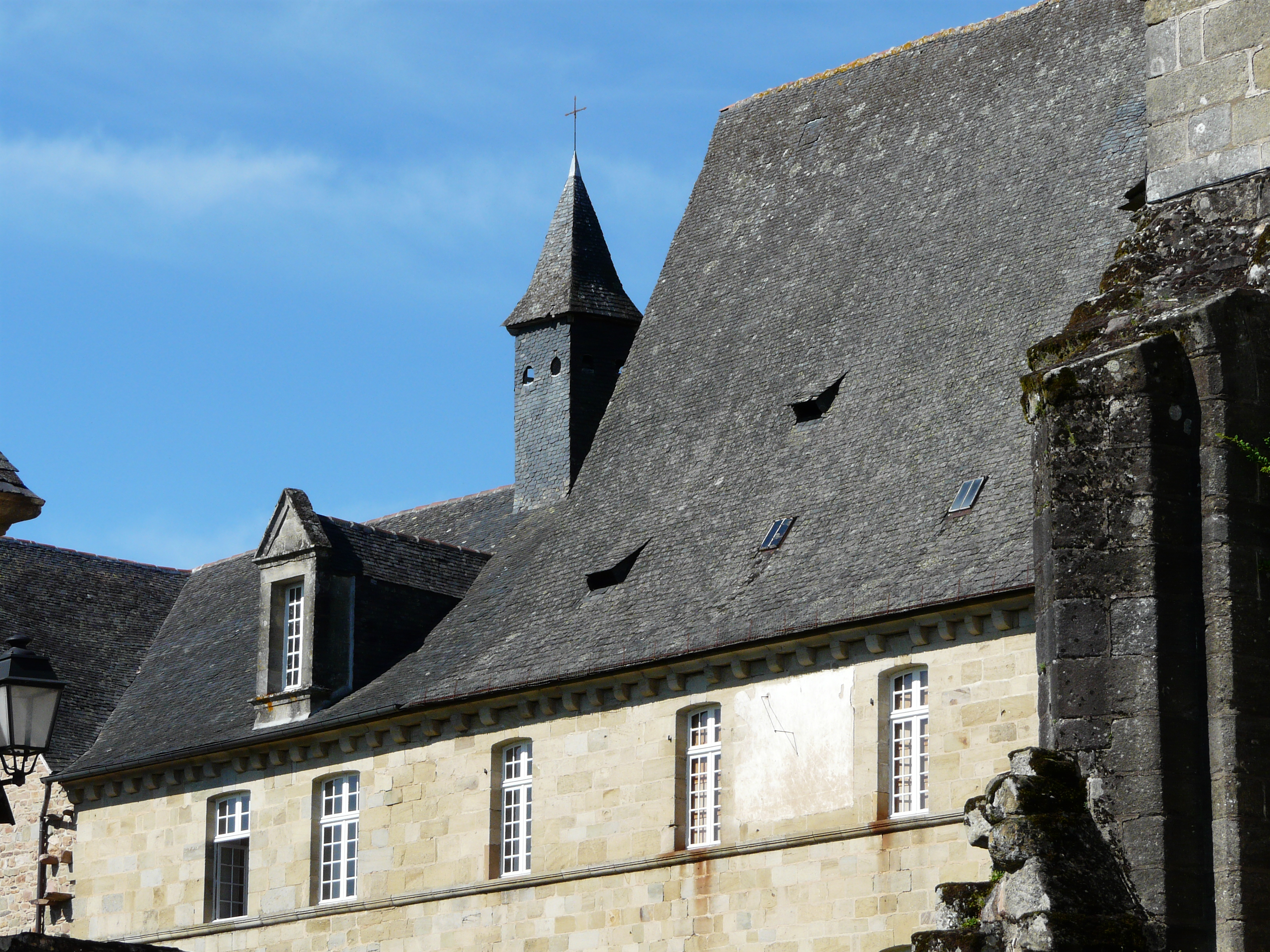 Les toits de l'abbaye d'Aubazine, Corrèze, France